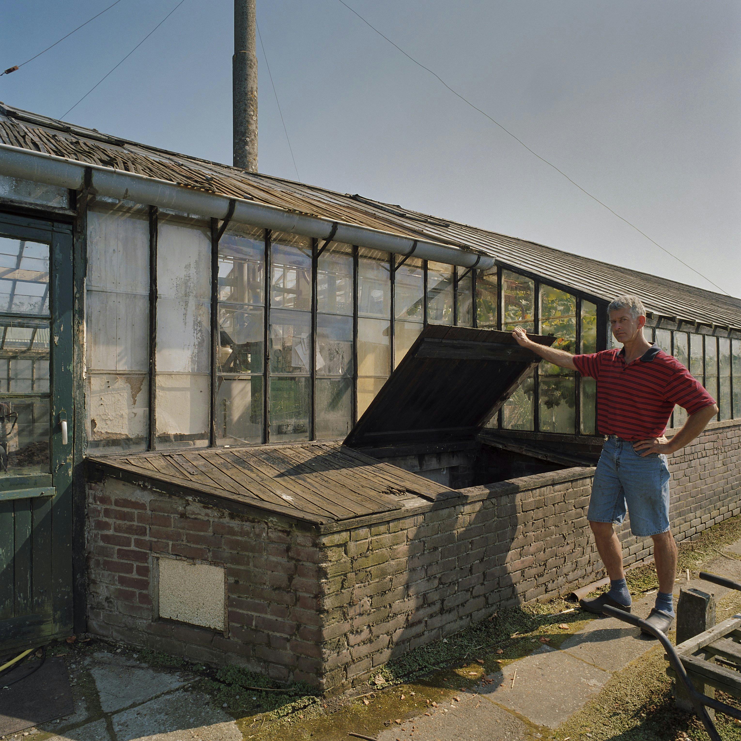 Kas: Gemetselde kolenvoorraadbak naast kas met poserende tuinder ervoor (opmerking: Kolenvoorraadbak op het terrein van Jan Joozen is uit 1958)